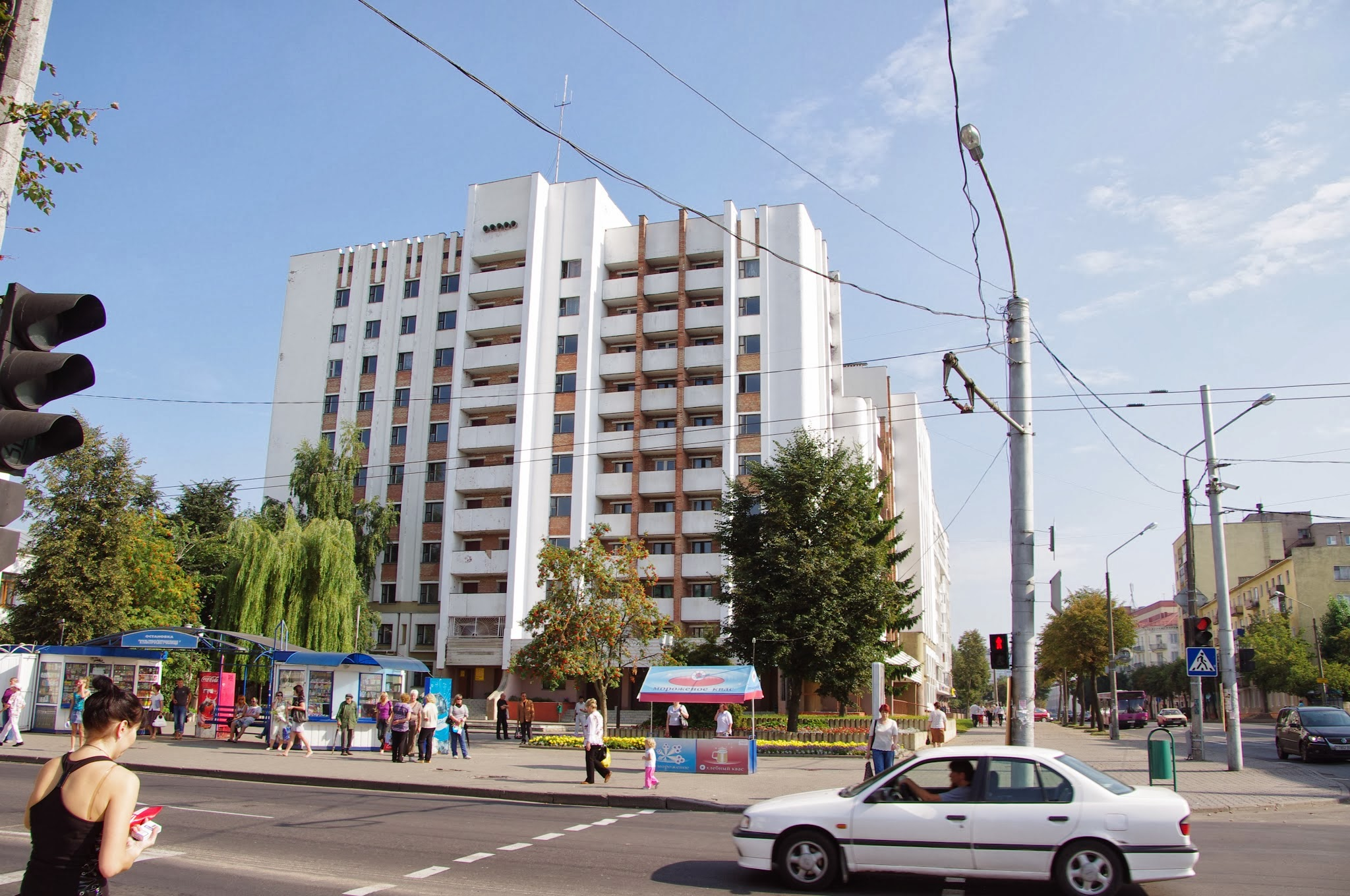 Mogilev, Belarus